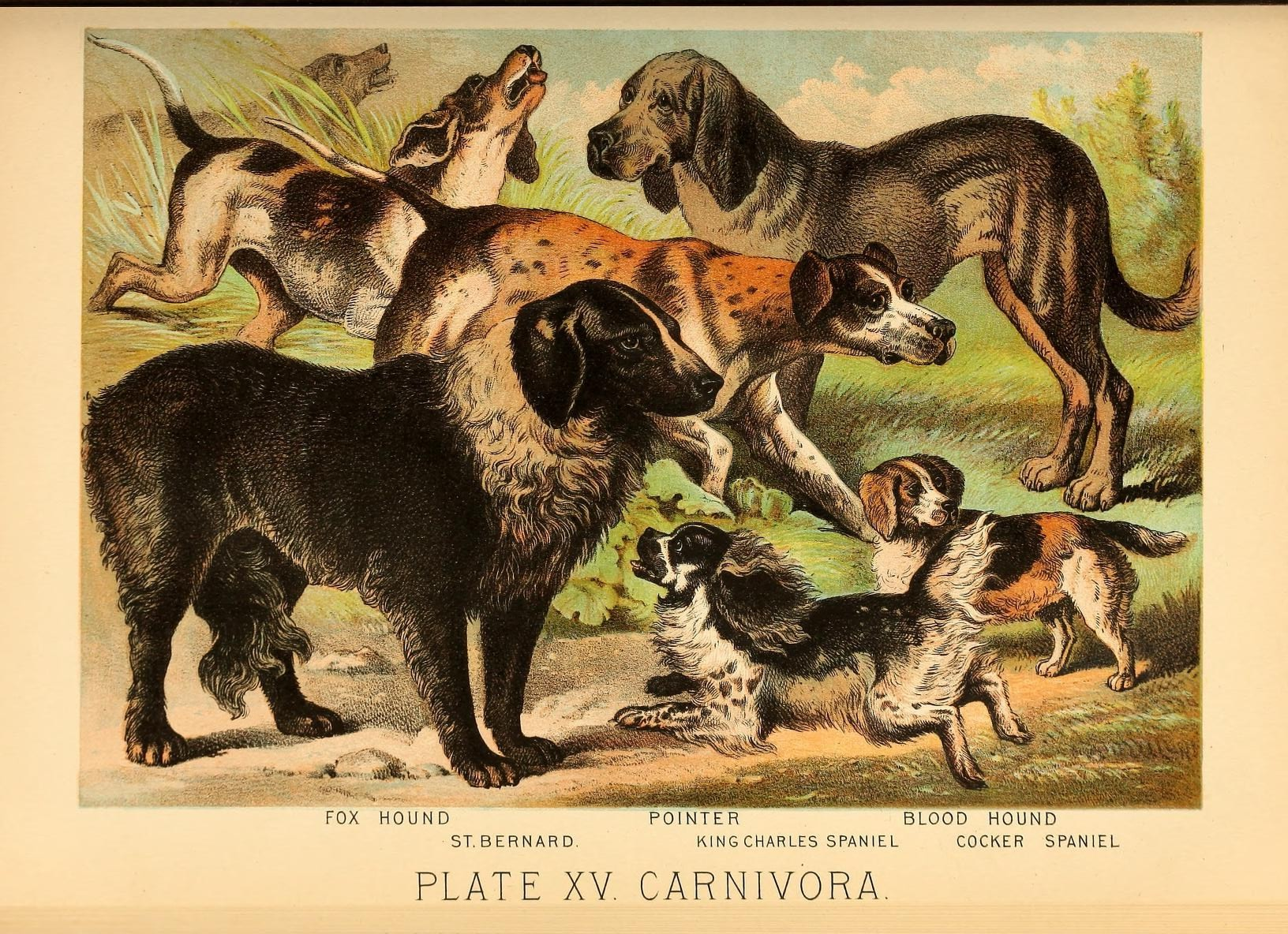 . PC o . s . o . X PU